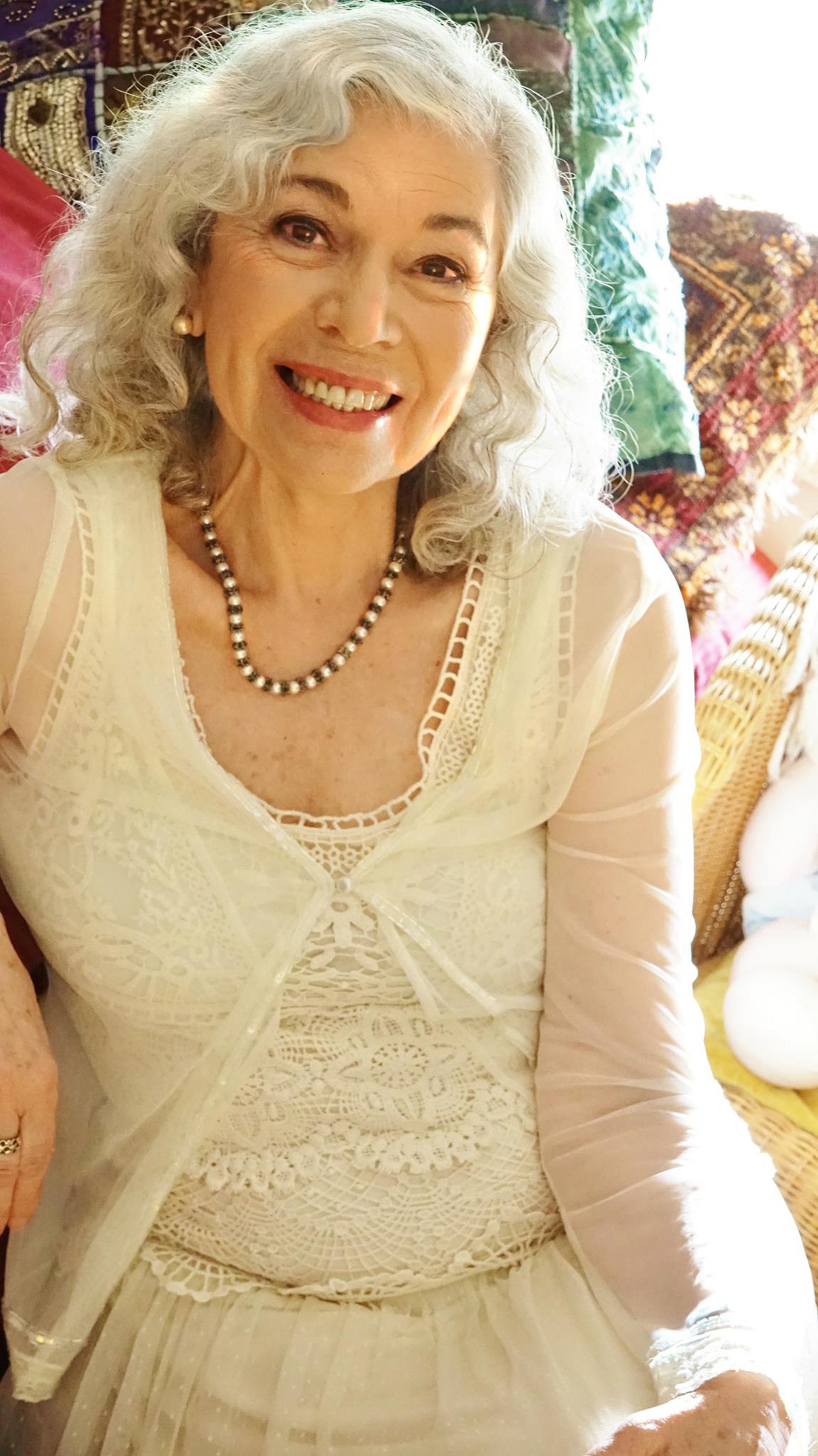 Sara Gilboa, Ma'ale Adomim, 2015